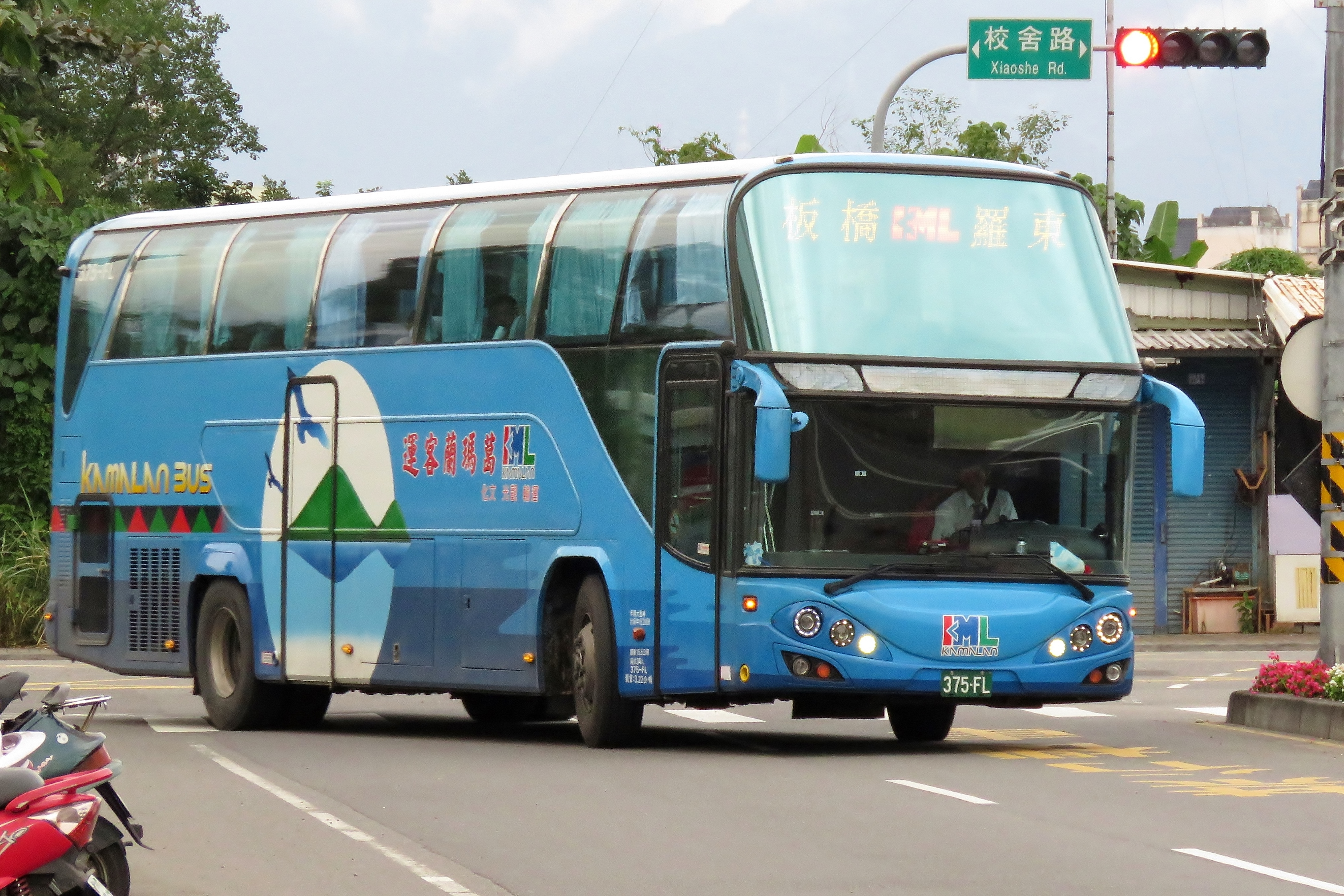 中文（台灣）: 葛瑪蘭客運2008 MITSUBISHI FUSO RM11GNL3 375-FY 1915路